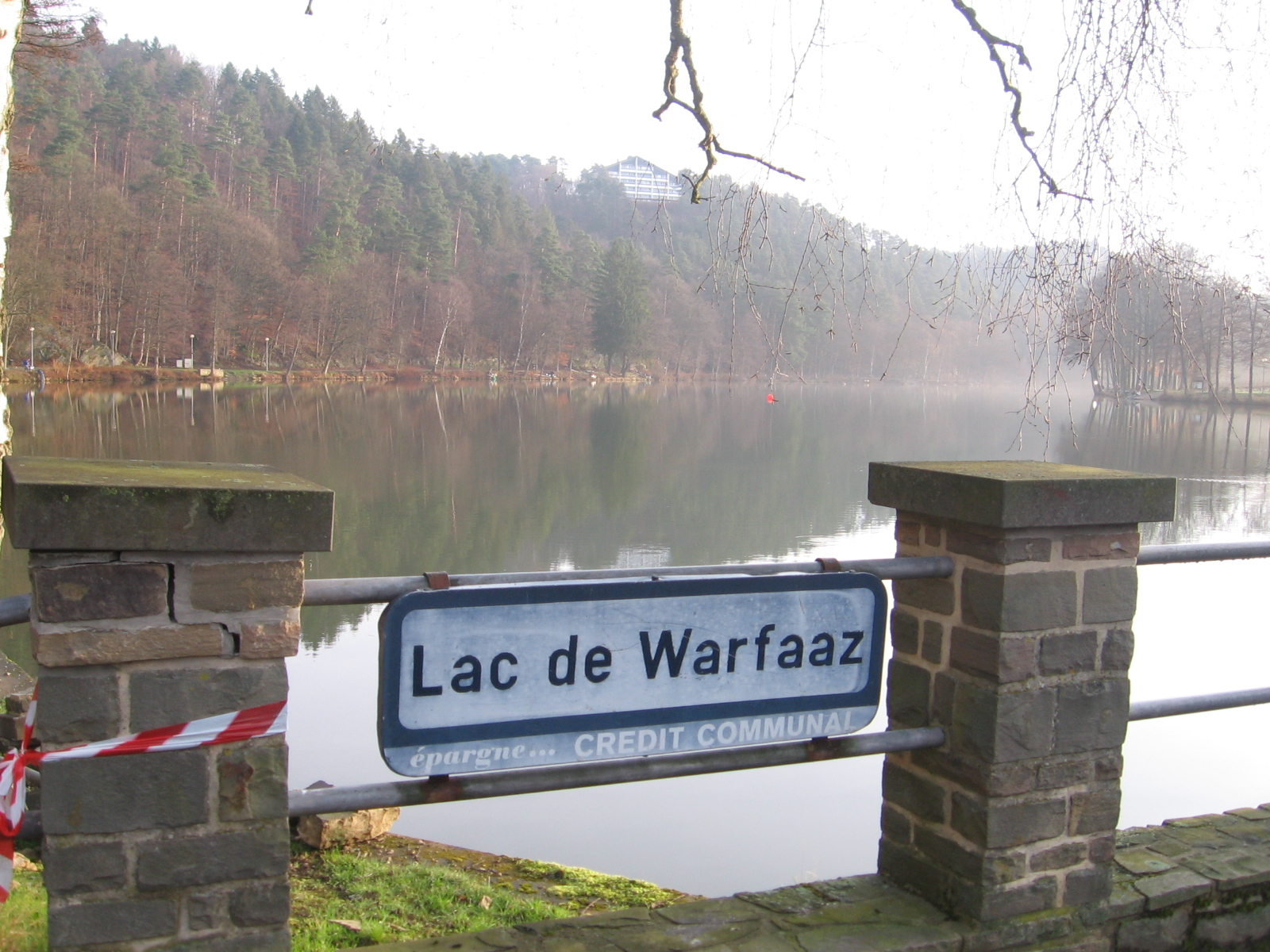 Lac de Warfaaz, Belgische Ardennen